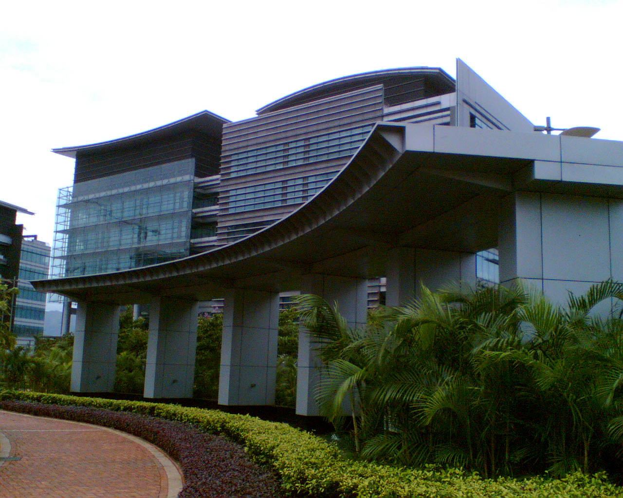 飛利浦大廈